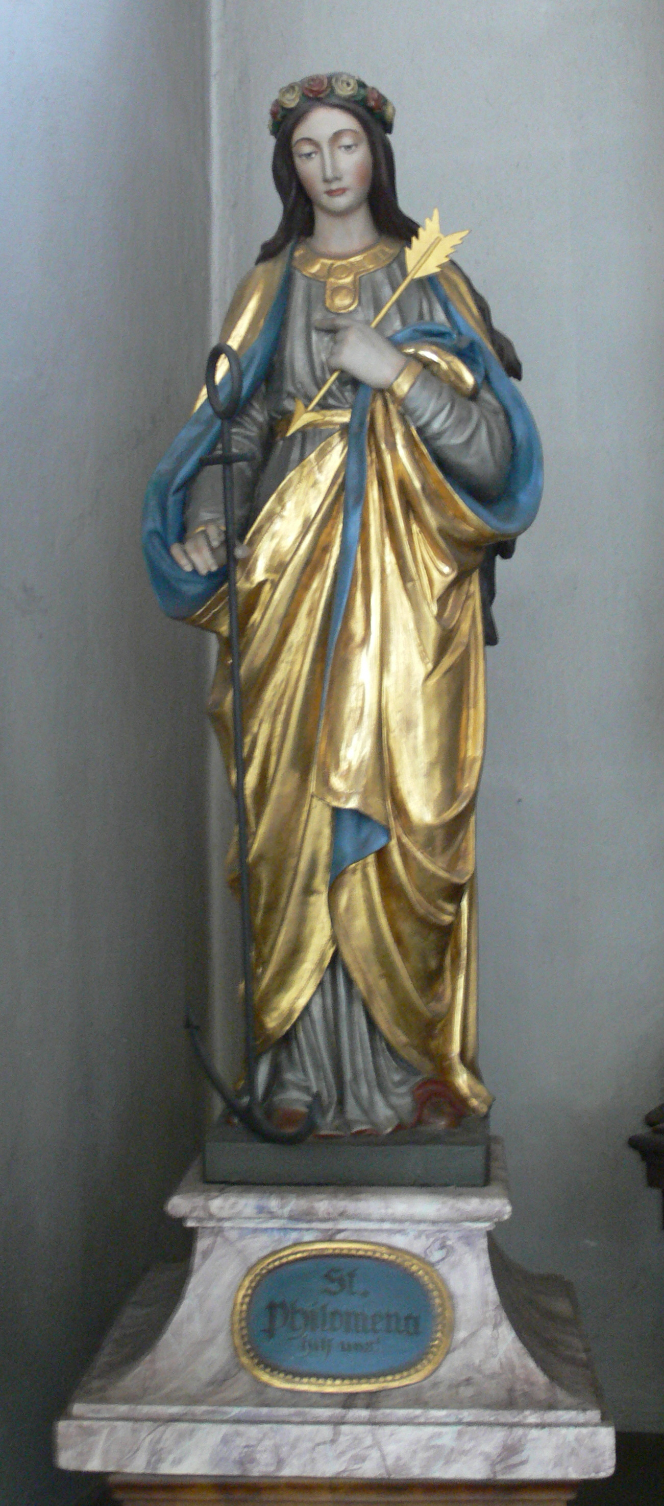 Bamberg, Obere Pfarrkirche Unsere Liebe Frau (Obere Pfarre) Hl. Phliomena